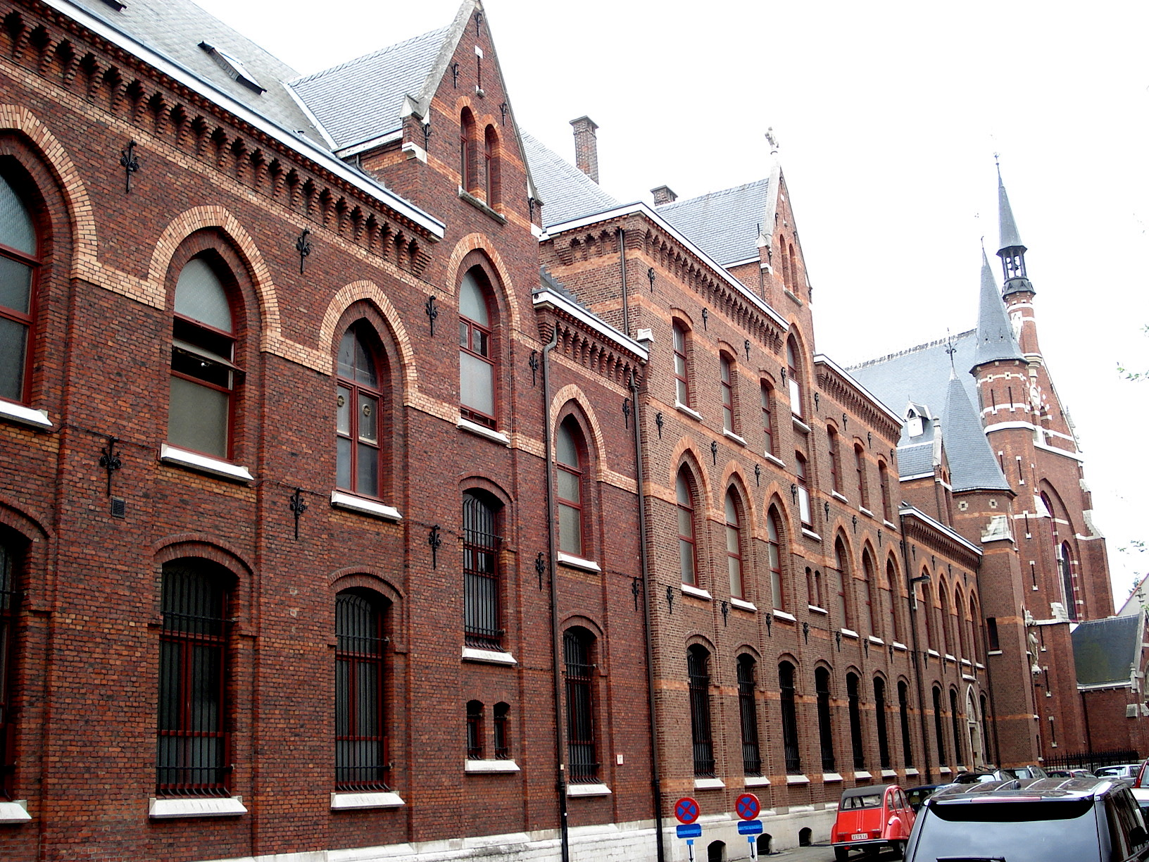 Basilek Heilig Hart Berchem-Antwerpen. Arch. J. Bilmeyer.